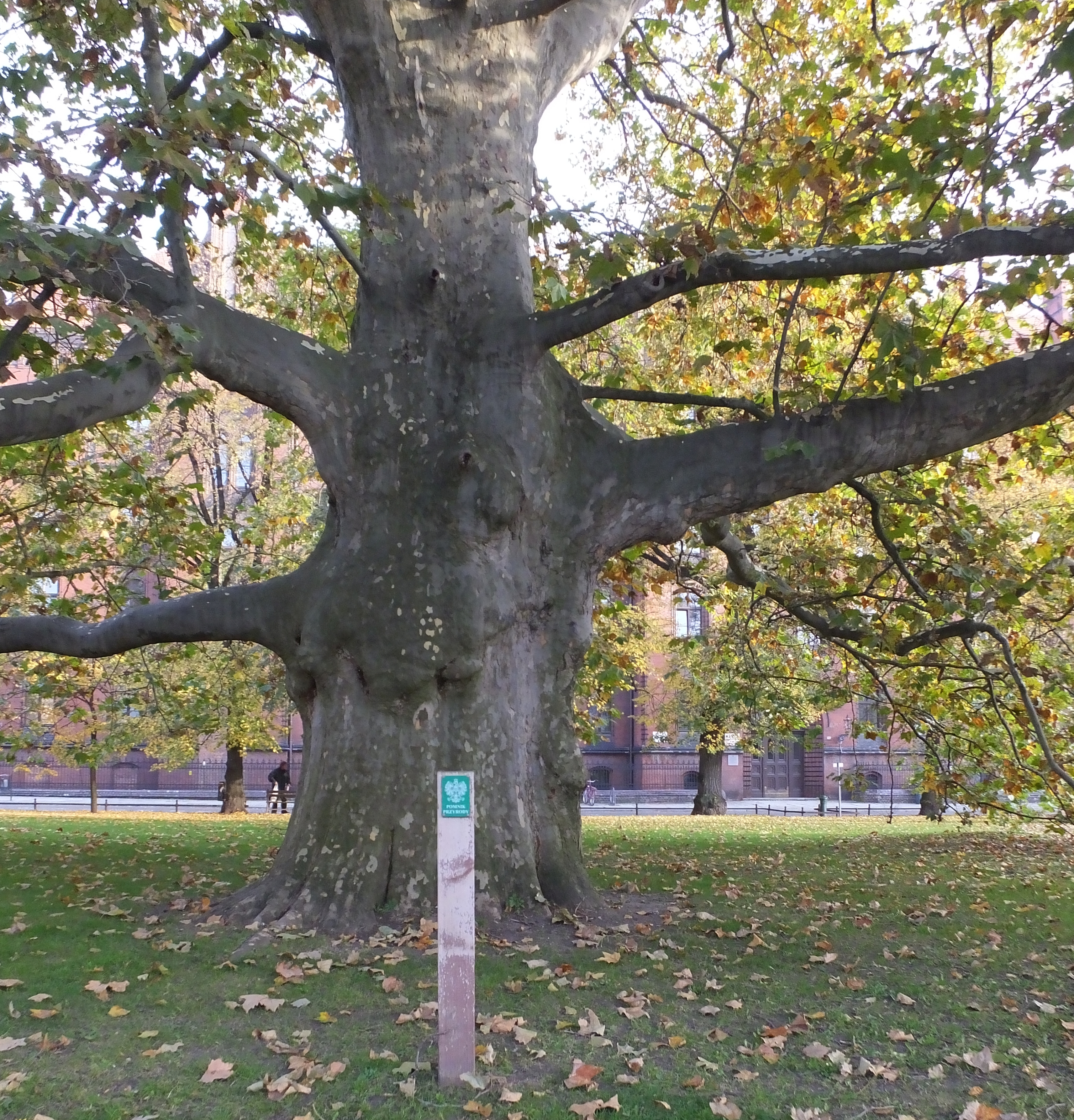 Platan na placu Katedralnym we Wrocławiu – pomnik przyrody